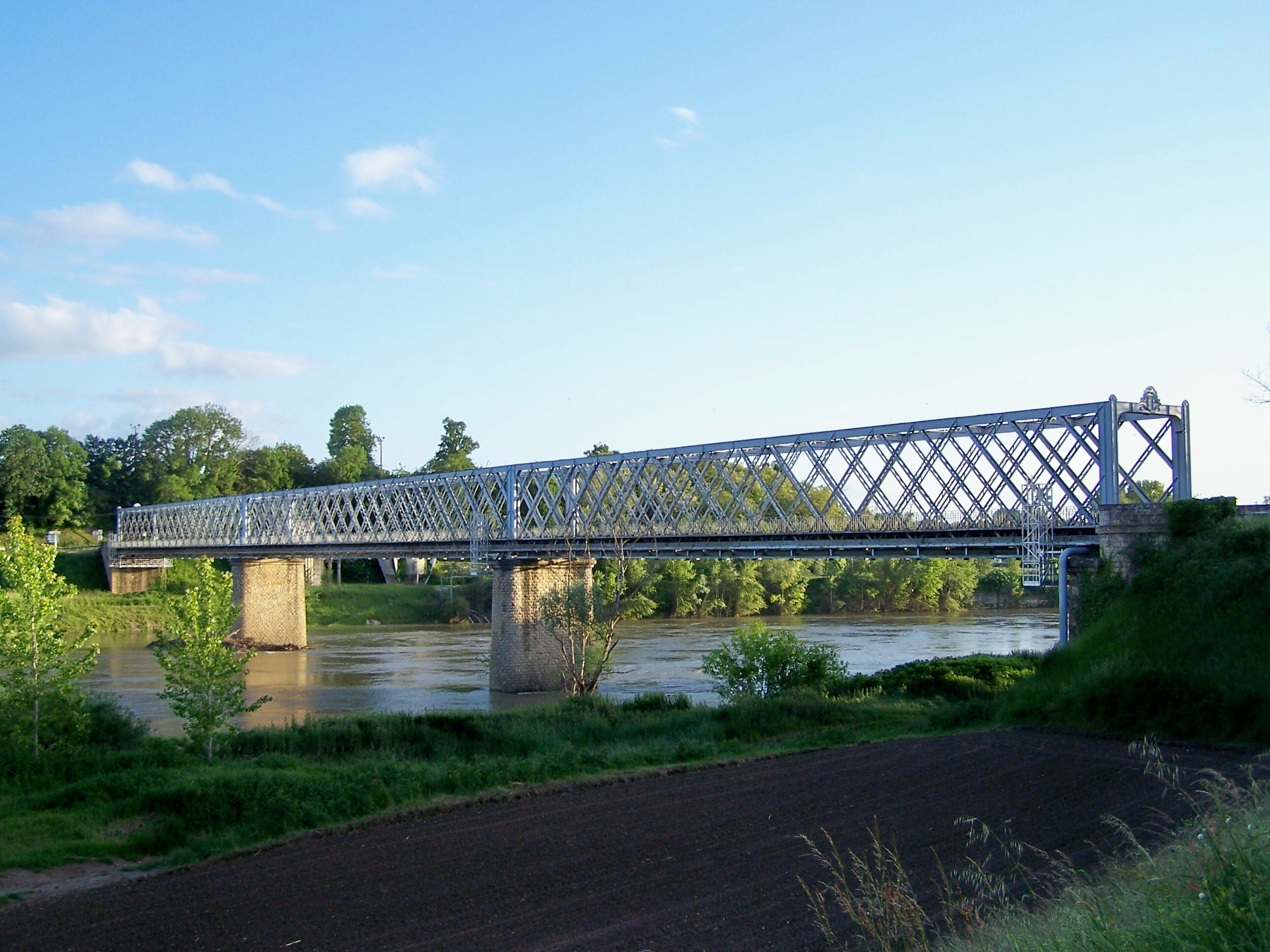 Pont sur la Garonne à Castets-en-Dorthe, Gironde, France